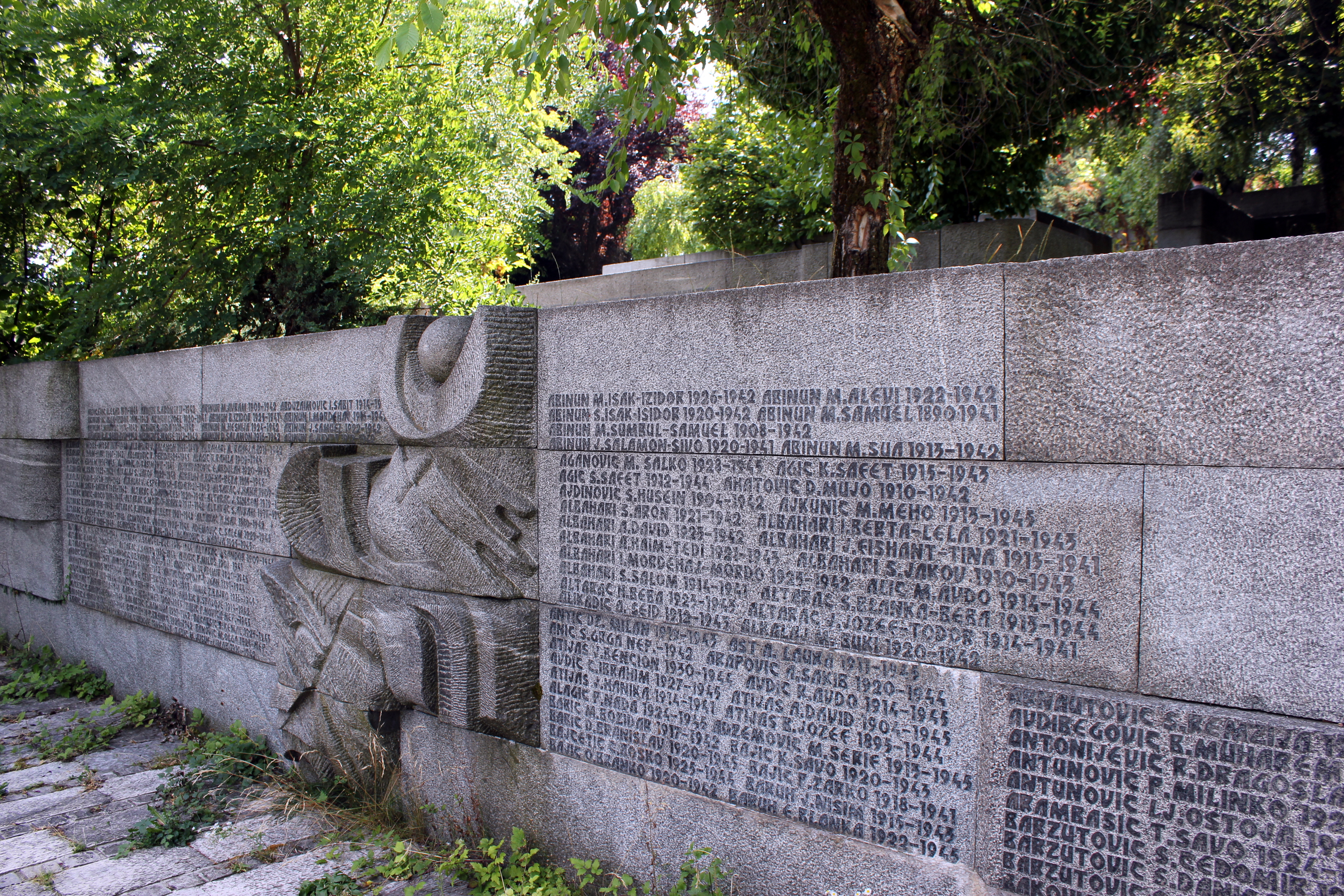 Denkmal im Spomen-park Vraca im Südwesten von Sarajevo.